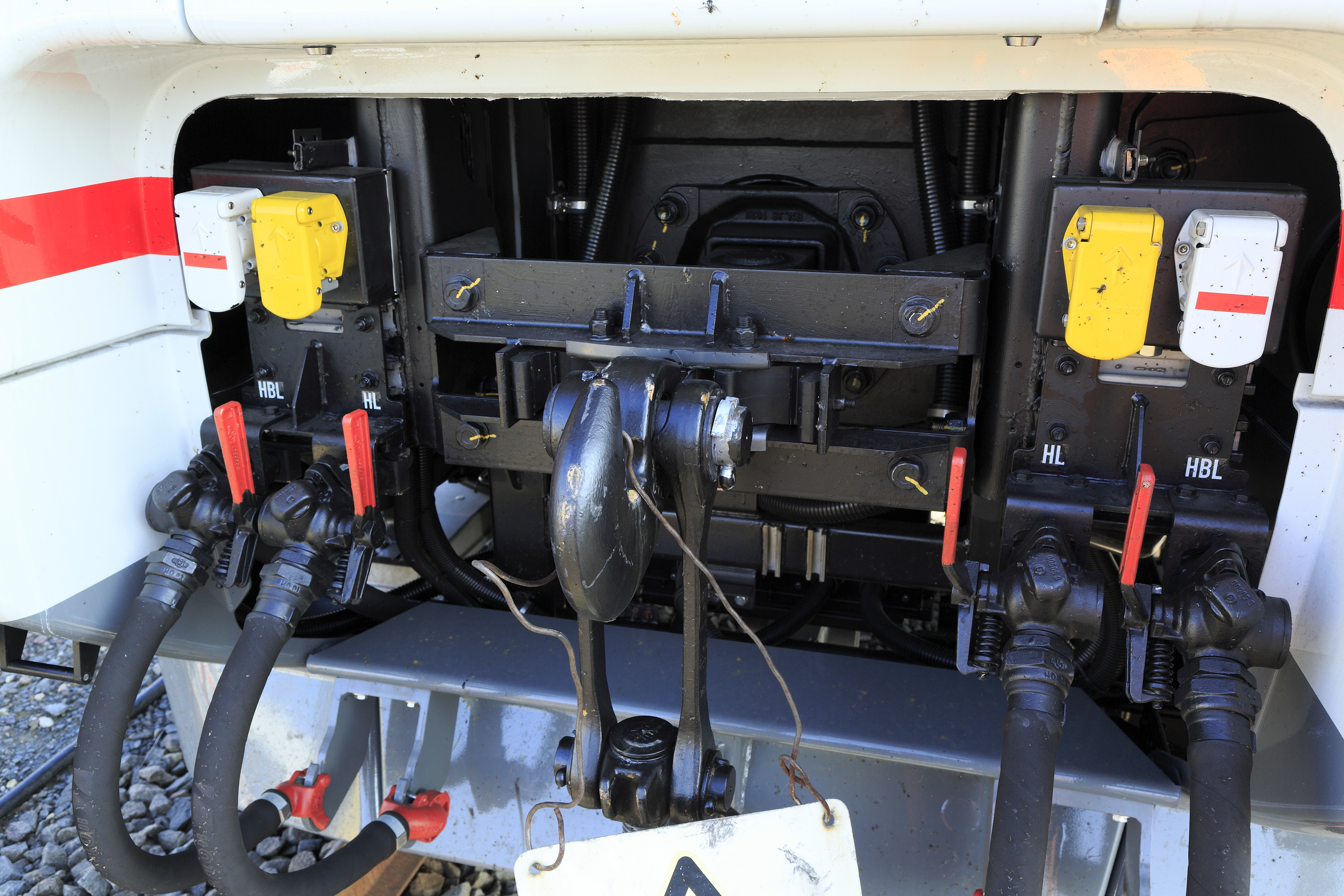 Pufferbohle mit Zugkastenöffnung eines Doppelstockfernbahnsteuerwagens; vier UIC-Kupplungsdosen, davon zwei gelbe, sind ein auffallender Unterschied zu den Regionalverkehrswagen. Eine Mittelpufferkupplung wäre problemlos einbaubar.